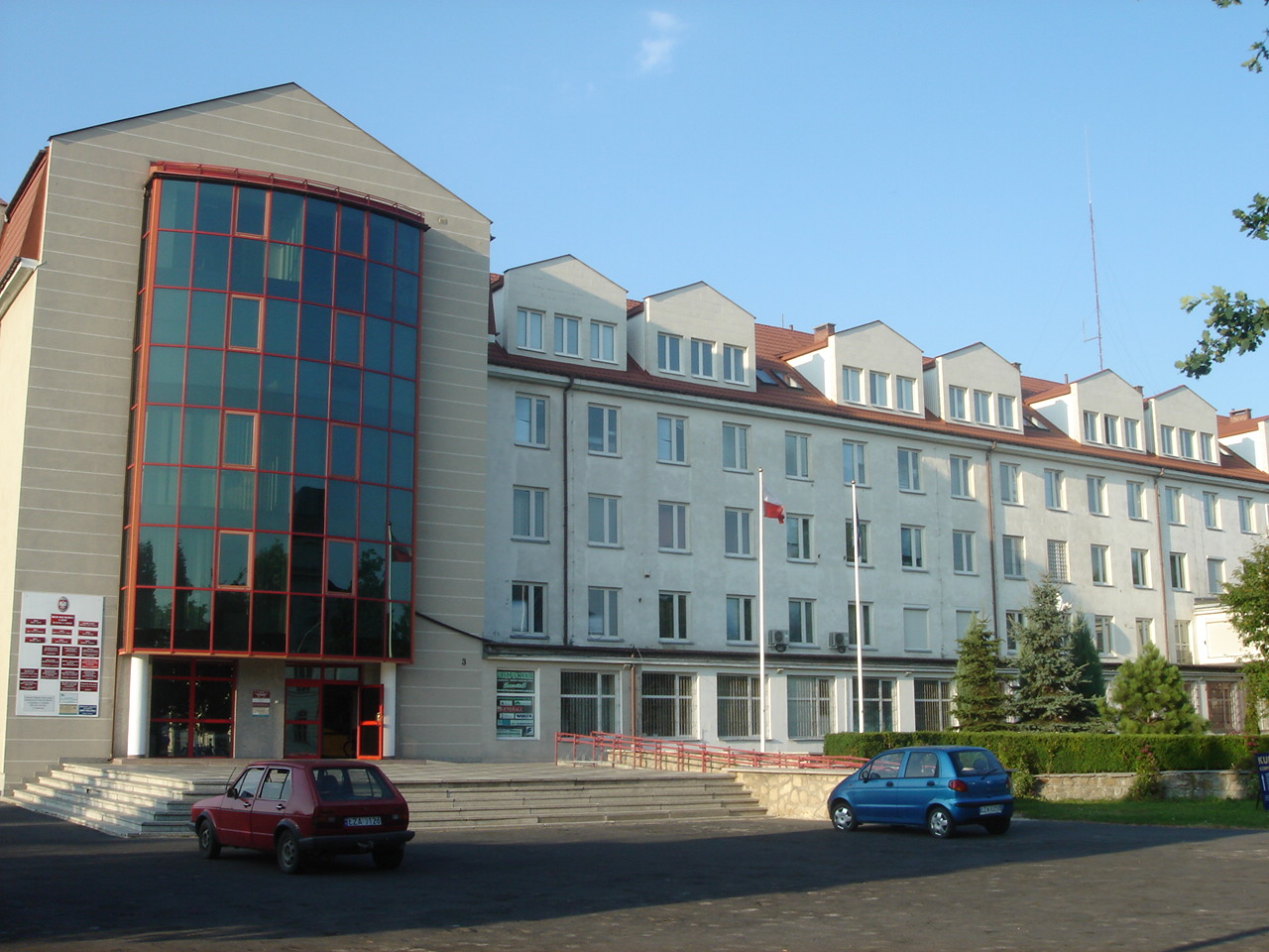 Lubelski Urząd Wojewódzki-delegatura w Zamościu